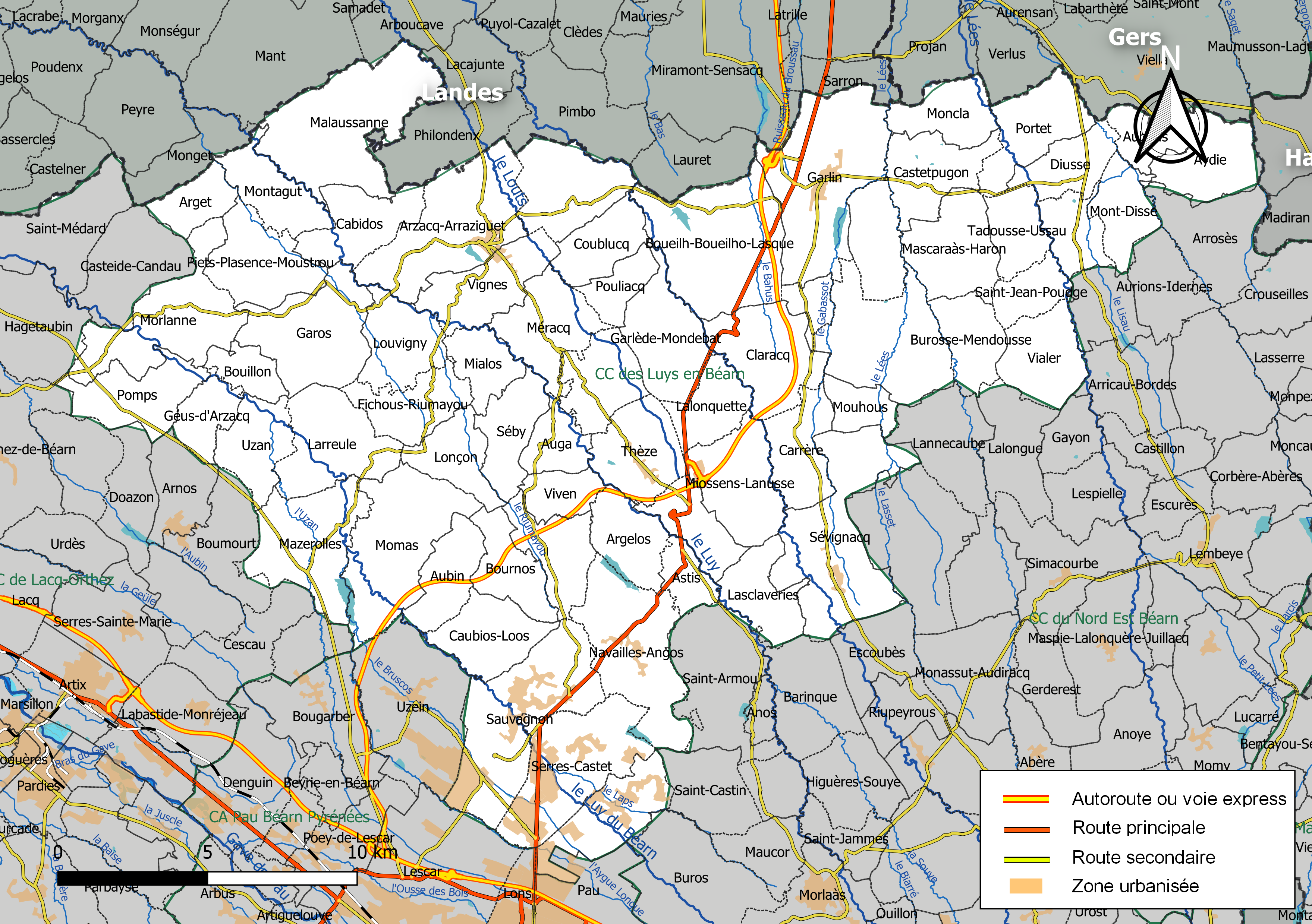 Carte géographique de la Communauté de communes des Luys en Béarn, département des Pyrénées-Atlantiques, France. Composition au 1er janvier 2019.